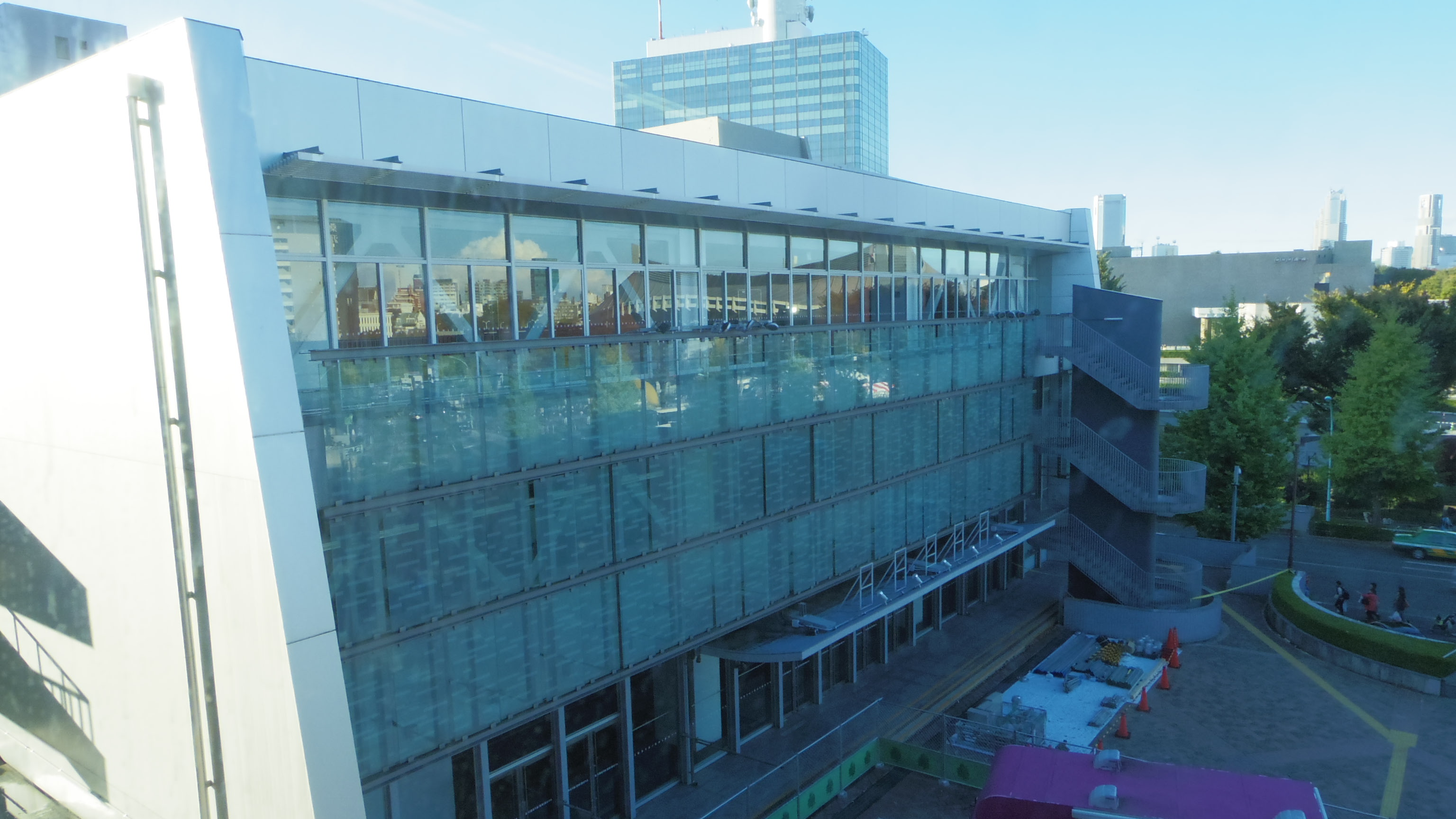 旧渋谷公会堂（東京都渋谷区）。1964年東京オリンピックにて重量挙げの会場として使用された後、様々なコンサート・演劇やテレビ番組（8時だョ!全員集合、ザ・トップテンなど）の公開放送の会場として使用された。一時期のみ命名権により「渋谷C.C.Lemonホール」としたことがある。 2015年11月3日に撮影。これは旧渋谷区役所5階から撮影したもの。